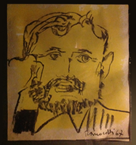 Egidio Spugni in arte Egidio da Casteldurante. Ritratto